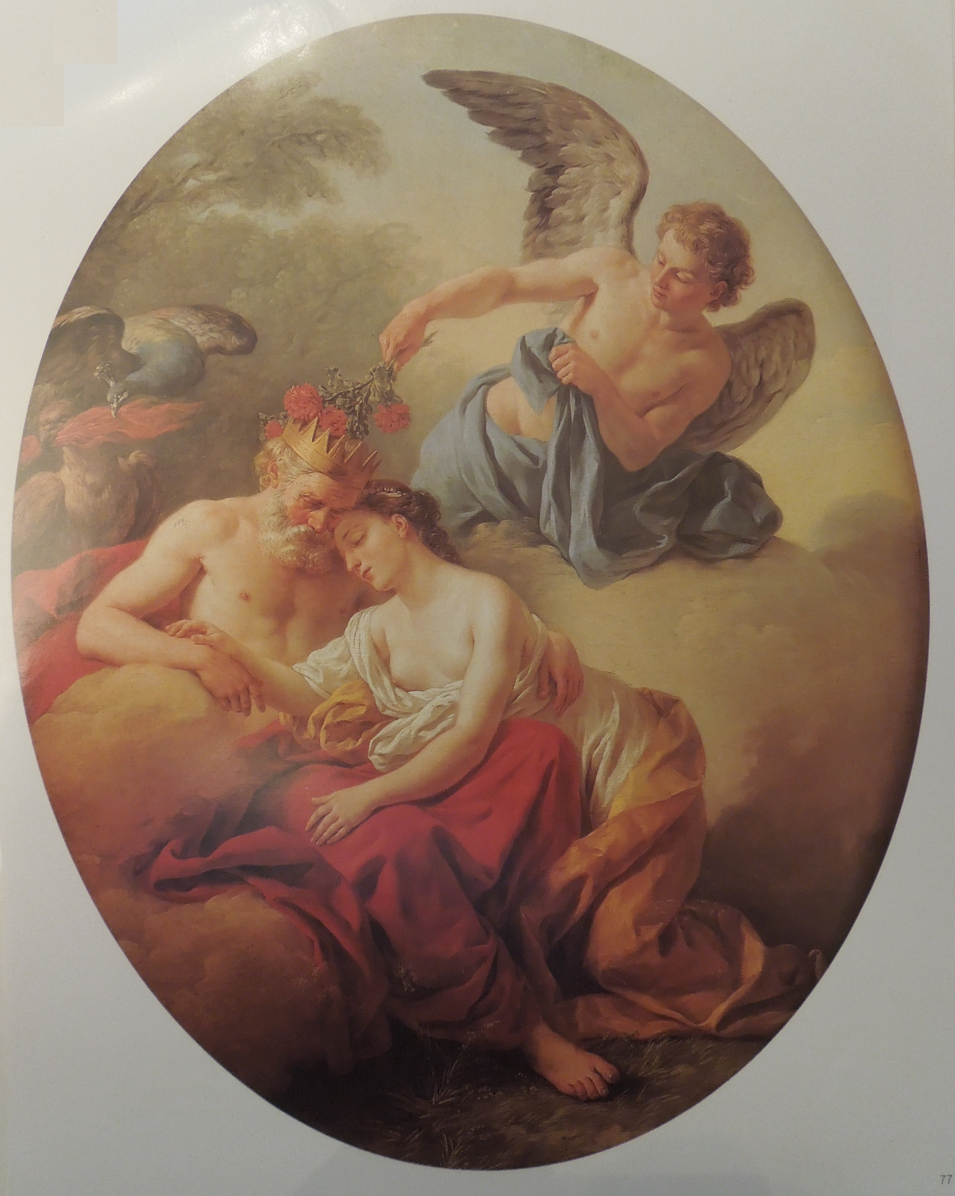 Jupiter et Junon sur le mont Ida, par Lagrénée, 1767. Peint pour la chambre du roi, oeuvre placée entre les deux croisées.